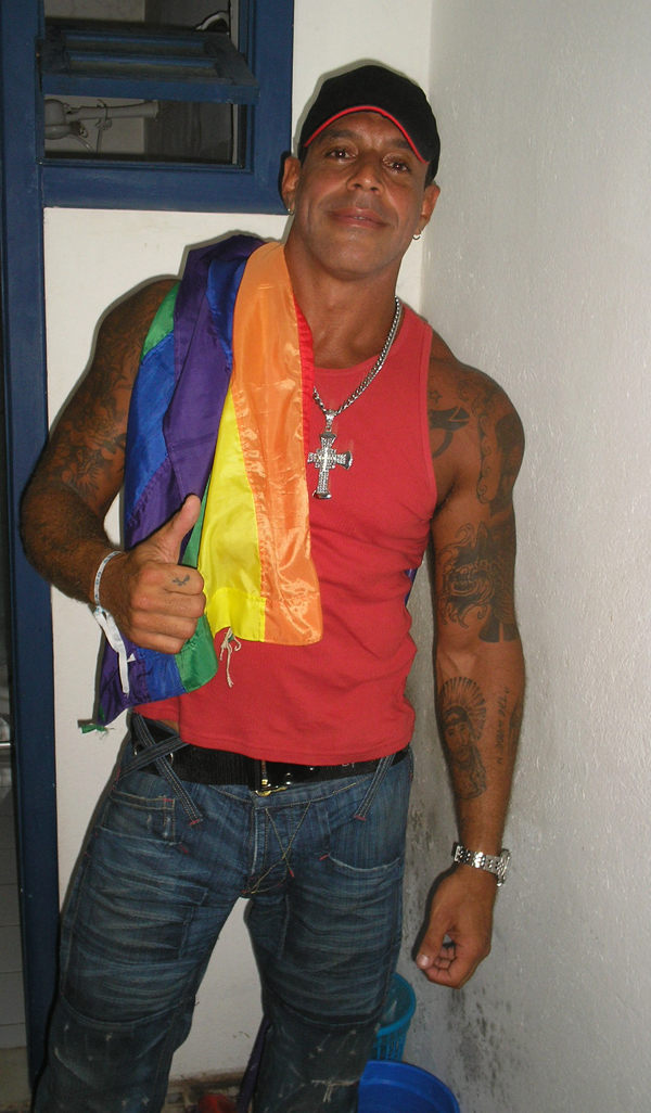 Alexandre Frota no Clube Planetário 11 no lançamento da G Magazine em 2006.